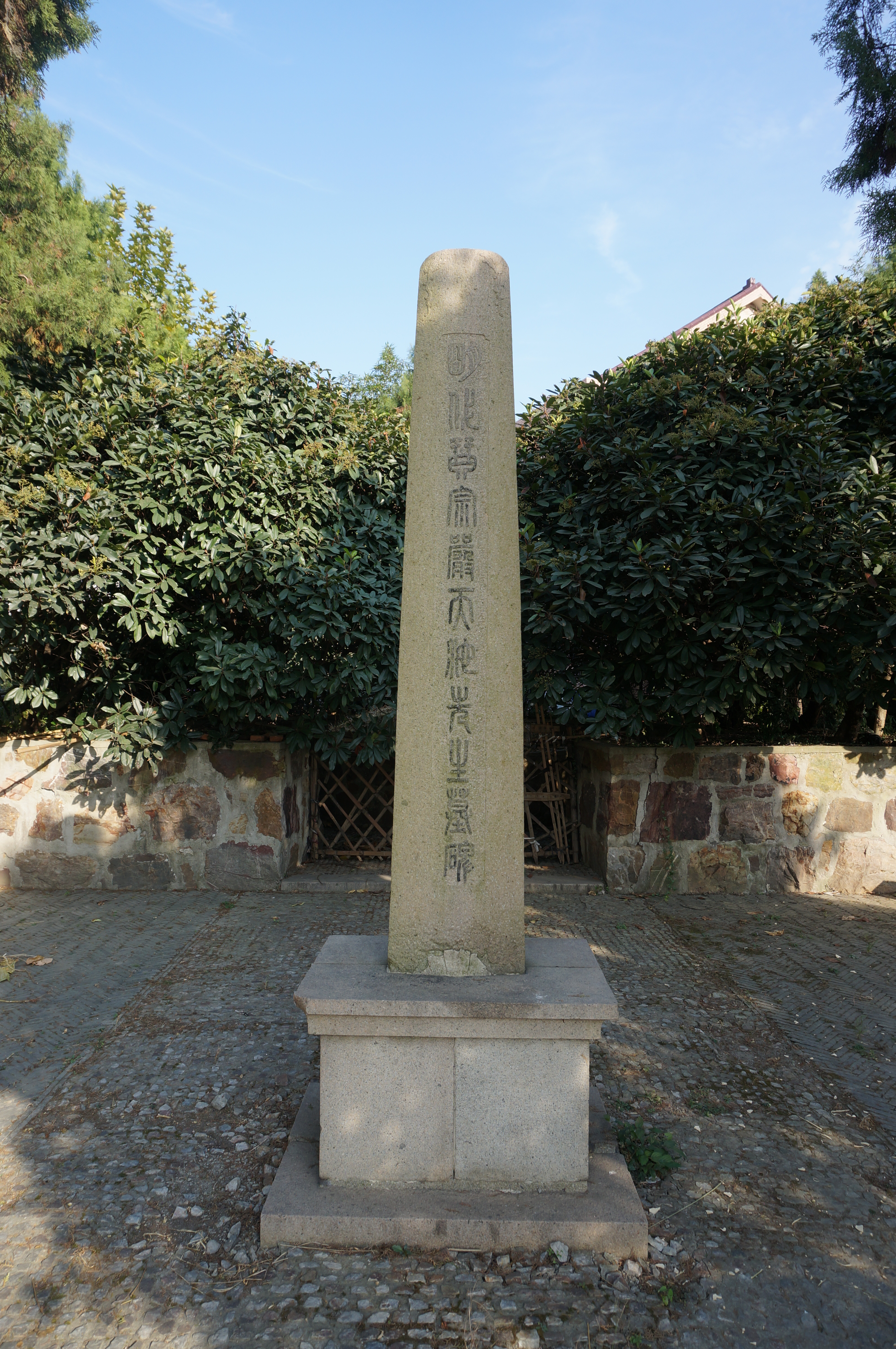 严天池墓，古琴式石碑。